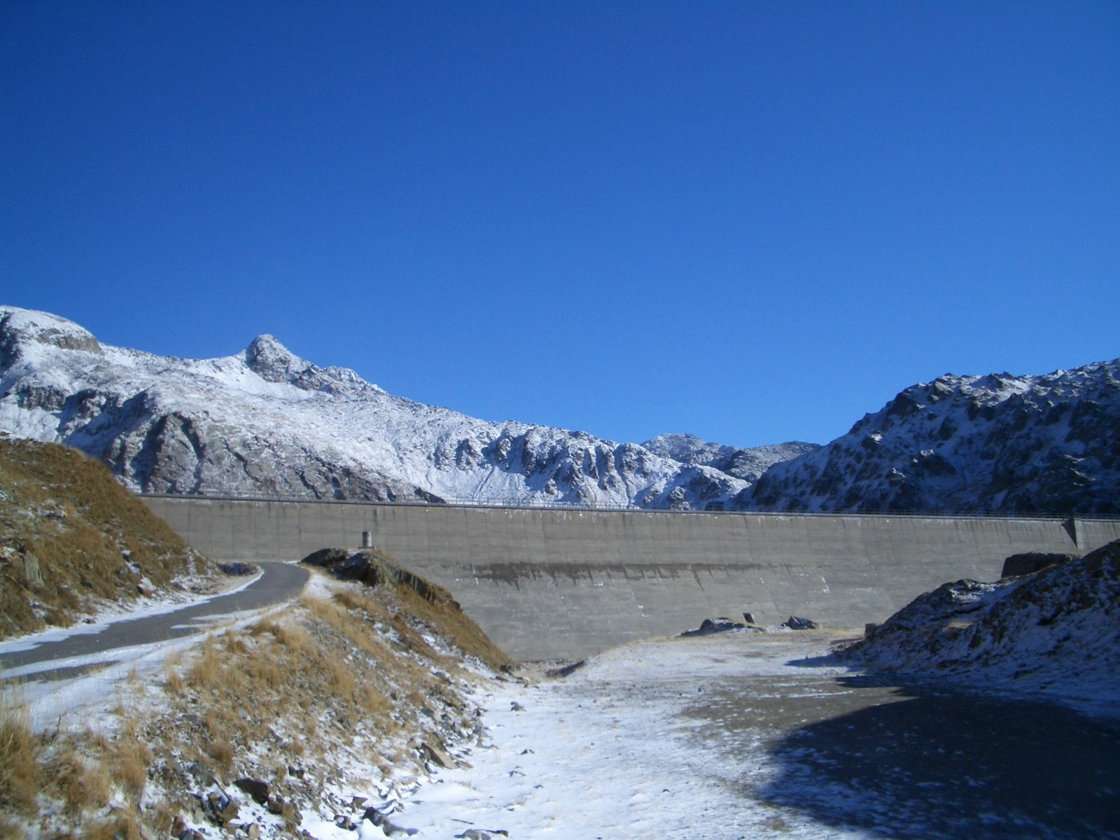 Lago Della Sella dam (2256 m), St. Gotthard, Switzerland